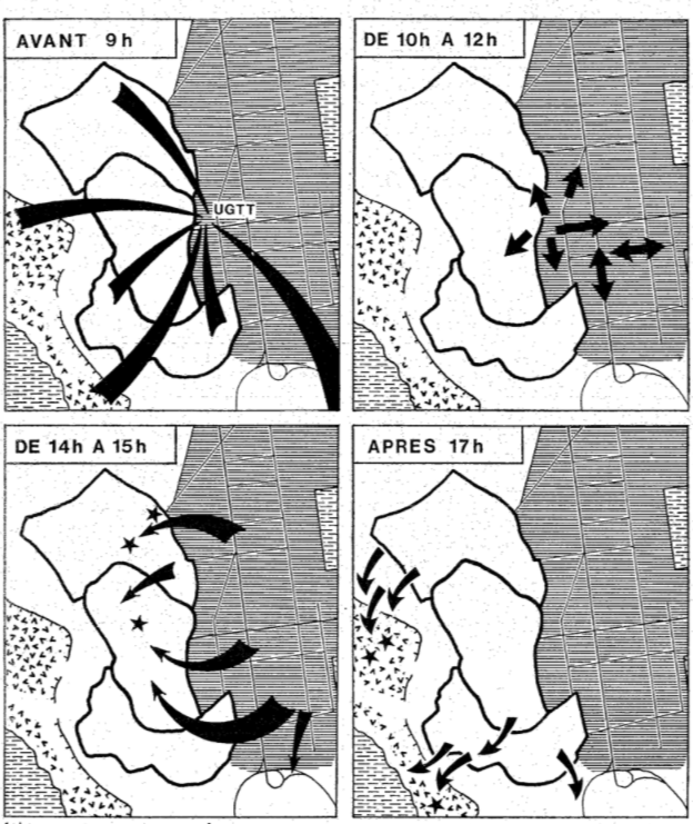 Avance de los manifestantes tunecinos en el jueves negro (26 de Enero de 1978)